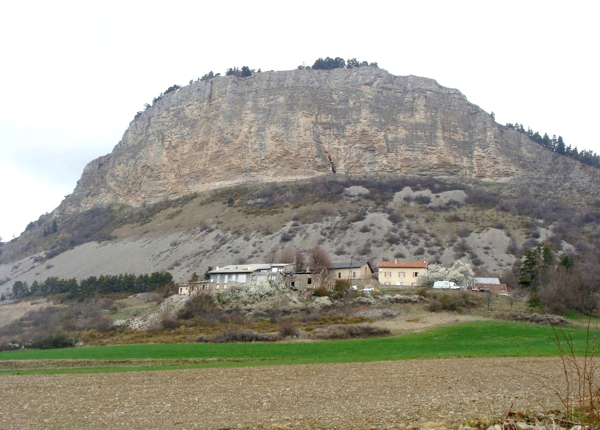 La Rochette (Hautes-Alpes): le hameau de l'Eglise, dominé par le "chapeau de Napoléon".